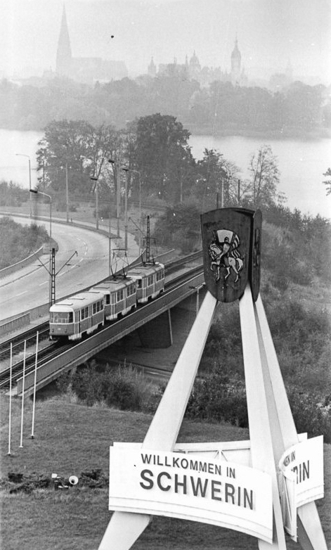 Schwerin, Straßenbahn Zum Beitrag: Für zehn Pfennige durch die ganze Stadt-100 Jahre wechselvolle Geschichte der Schweriner Straßenbahn ADN-ZB Pätzolg-30.10.1981-ha. Eine Strecke der Schweriner Straßenbahn führt am Faulen See entlang, wobei sie die Altstadt mit dem Neubaugebiet Großer Dreesch verbindet. Es ist eine junge Strecke, die hier befahren wird. Andere Strecken wurden in der langen Geschichte der Schweriner Straßenbahn überflüssig, die im November dieses Jahres ihr 100. Jubiläum feiert. (Hierzu gehören auch Z1030-303-305N)